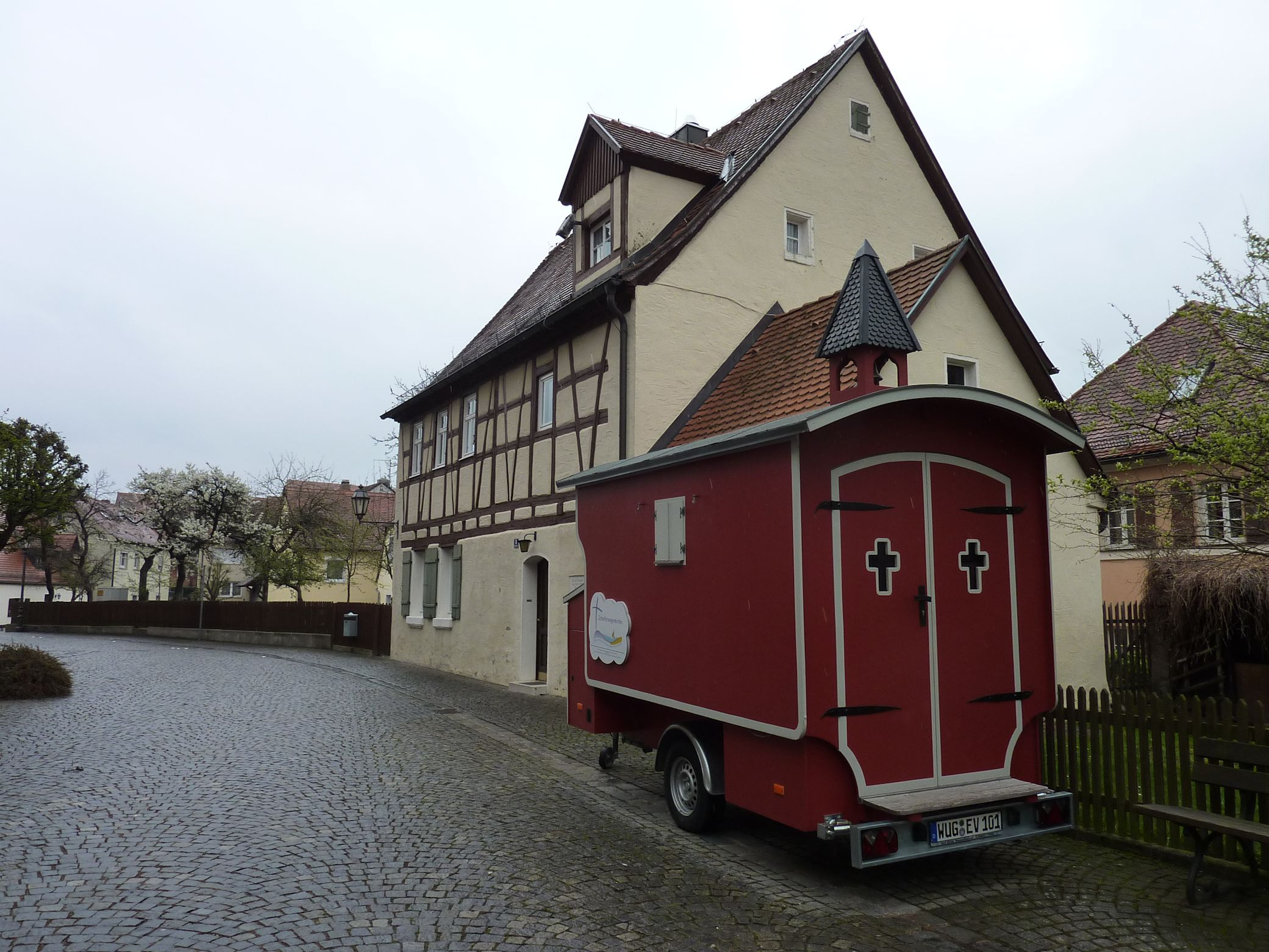 eine Schäferwagenkirche in Gunzenhausen